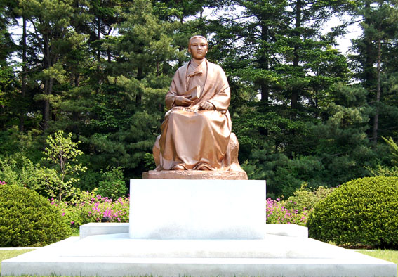 Statut de Kang Pan-sok à Mangyongdae, Pyongyang